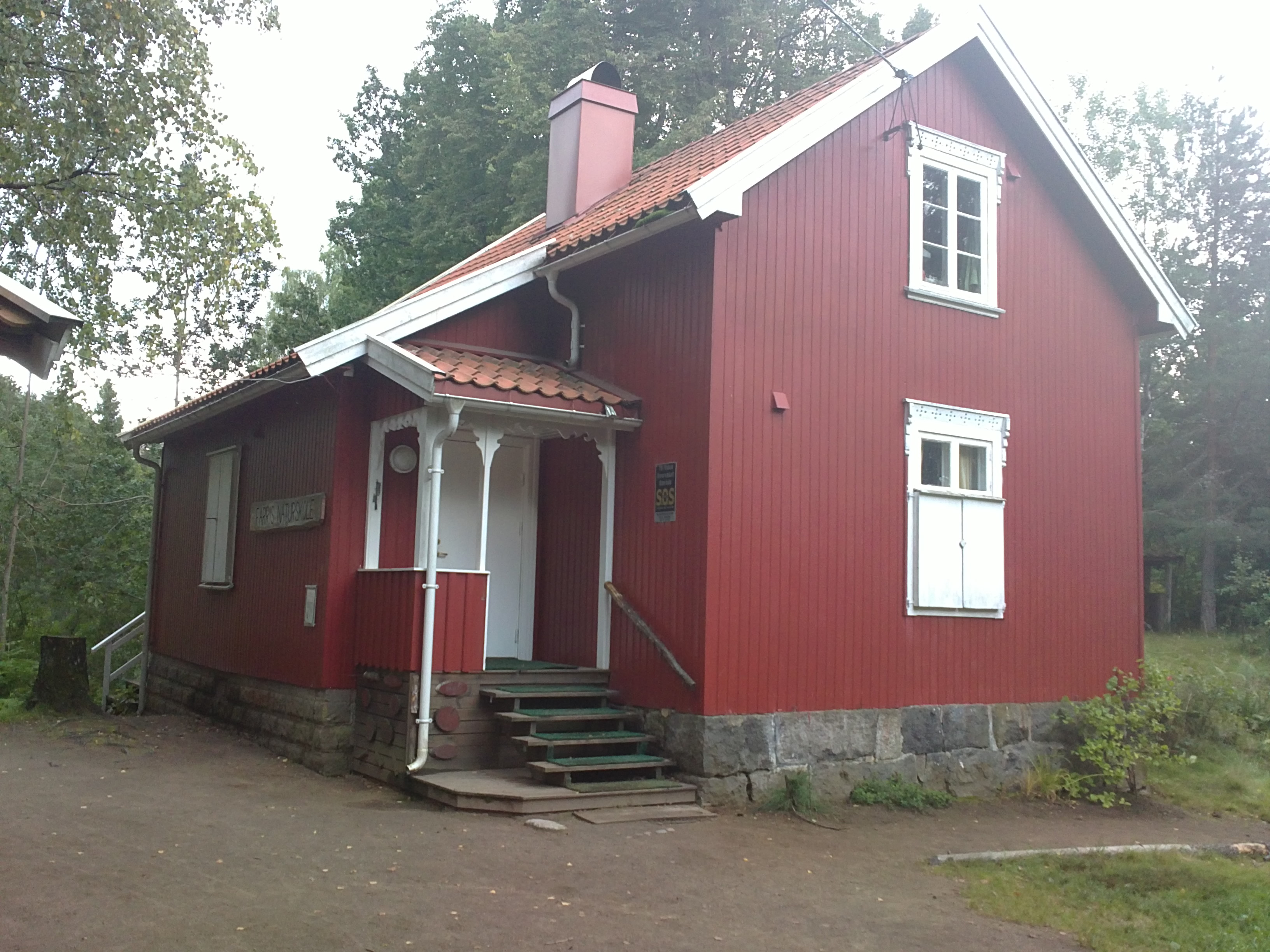 Bilde av Farris Naturskole